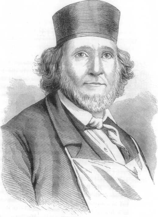 Hiram Powers - Project Gutenberg eText 15161 From